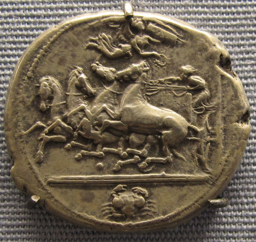 Catania, tetradracma firmata euainetos, 420 ac